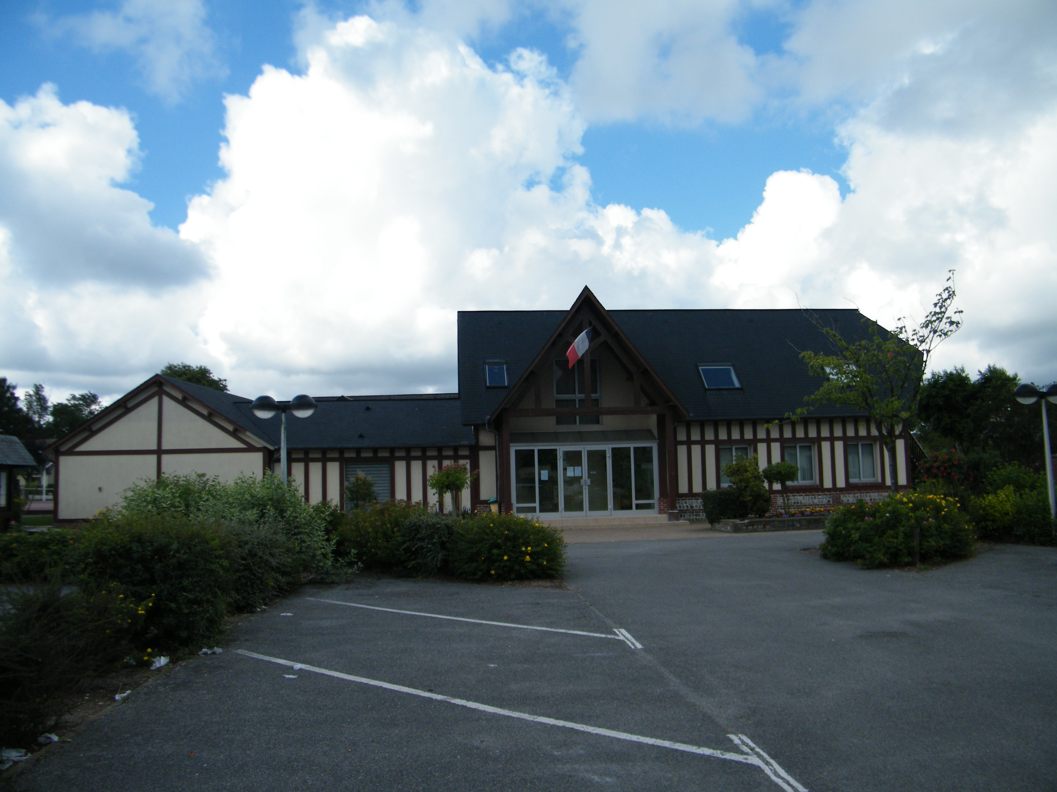 Grèges, Seine-Maritime, France, mairie